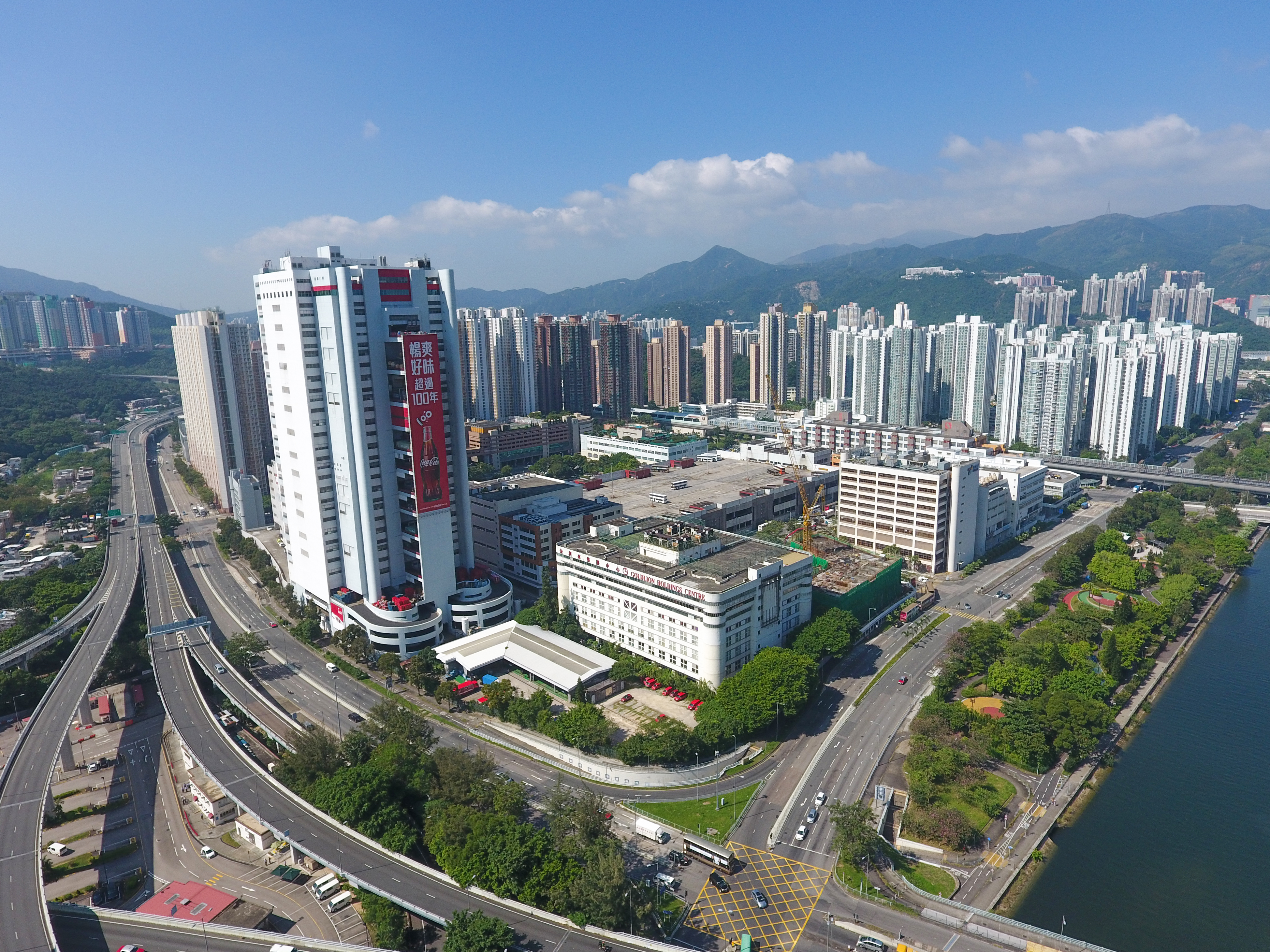 Siu Lek Yuen Industiral Area